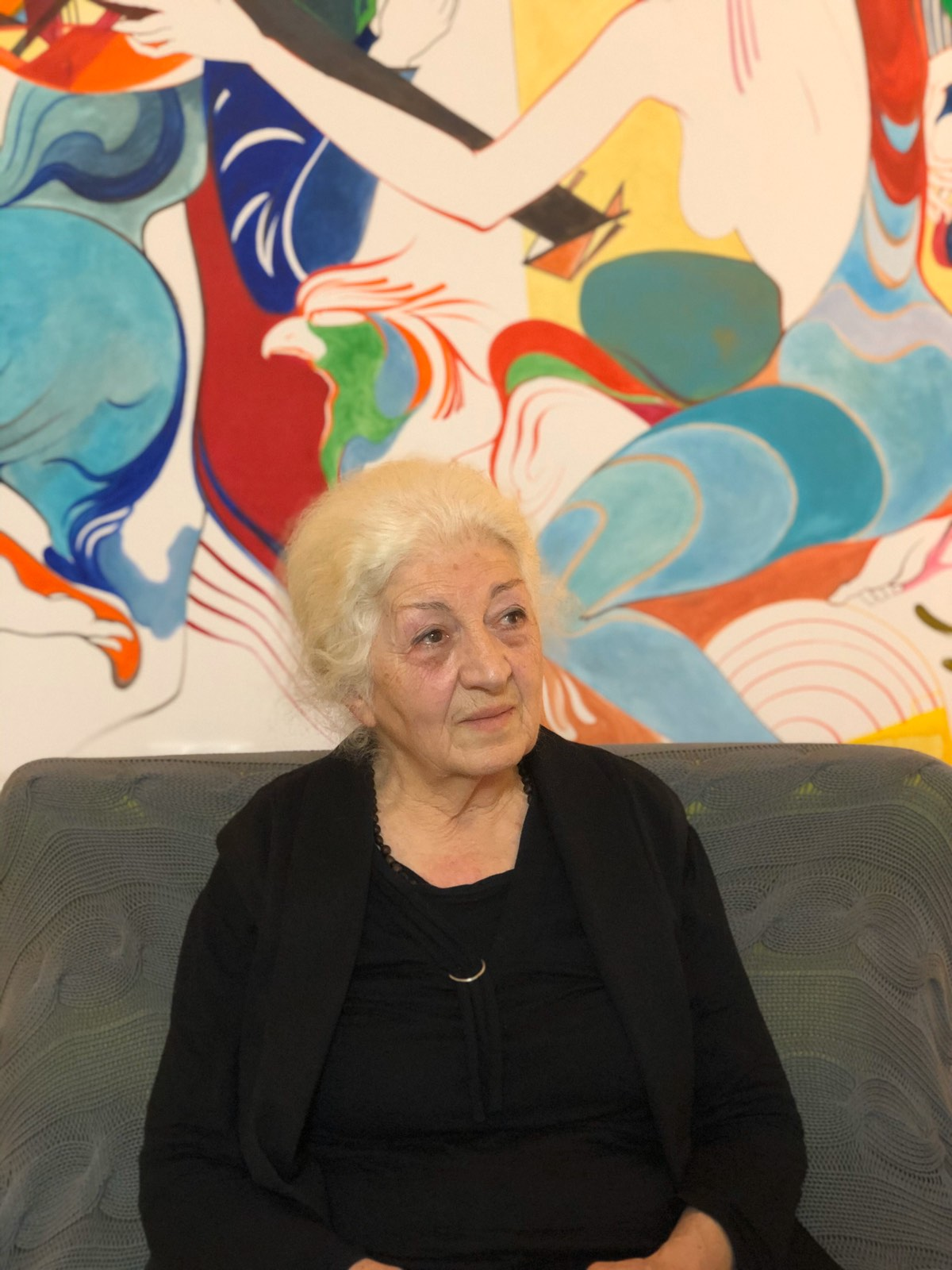 современный грузинский поэт и драматург